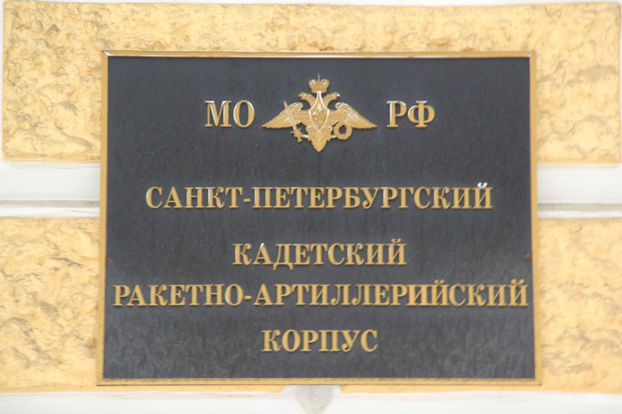 На здании КРАКа